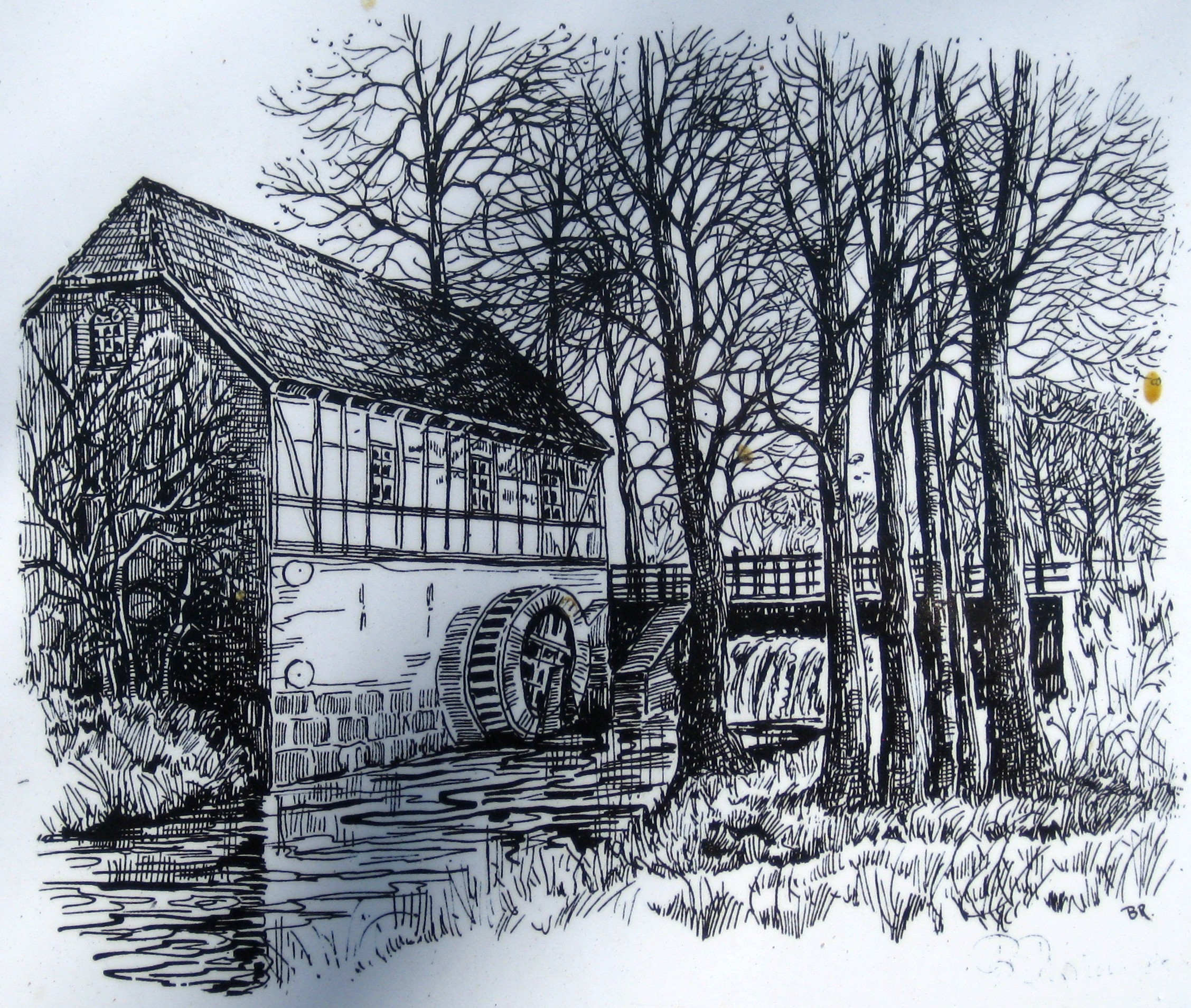 Die Meyenburger Wassermühle in Schwanewede-Meyenburg (Zeichnung auf der Informationstafel an der Mühle)